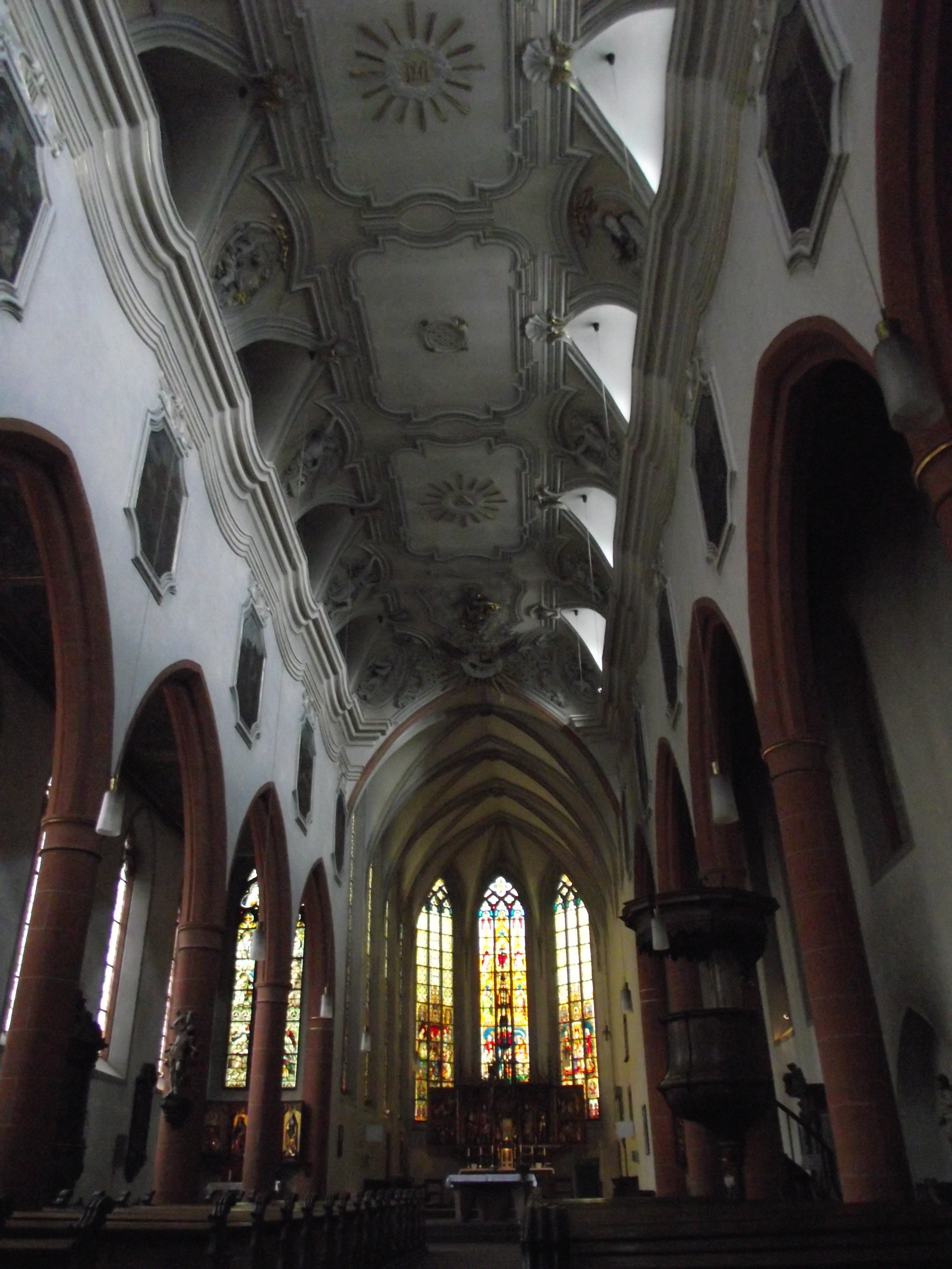 Limburg an der Lahn, Stadtpfarrkirche Sankt Sebastian